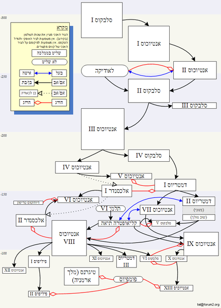 כרונולוגיה של השלטון בממלכה הסלבקית